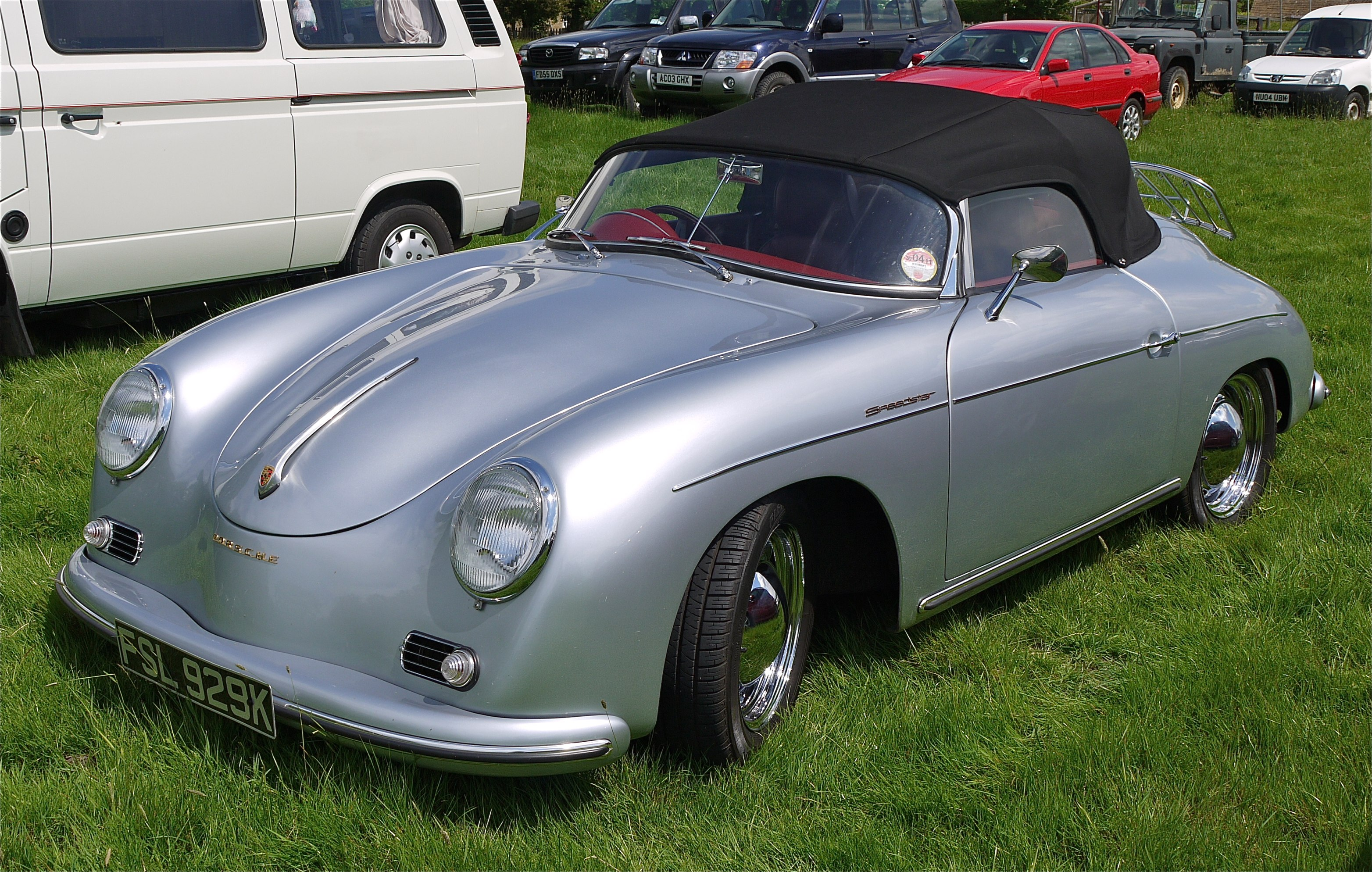 Panasonic G1 14-45 Lens